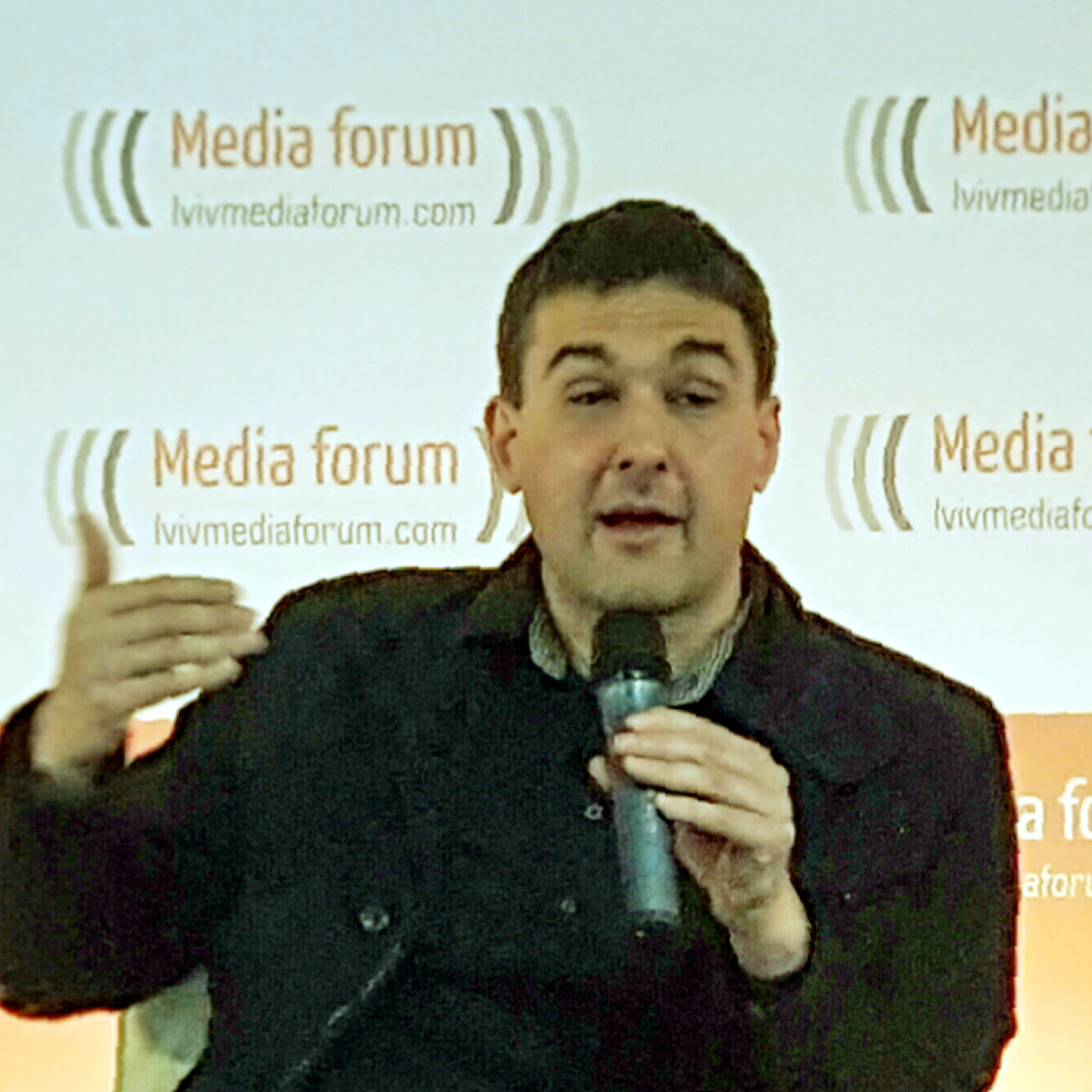 Boris Reitschuster